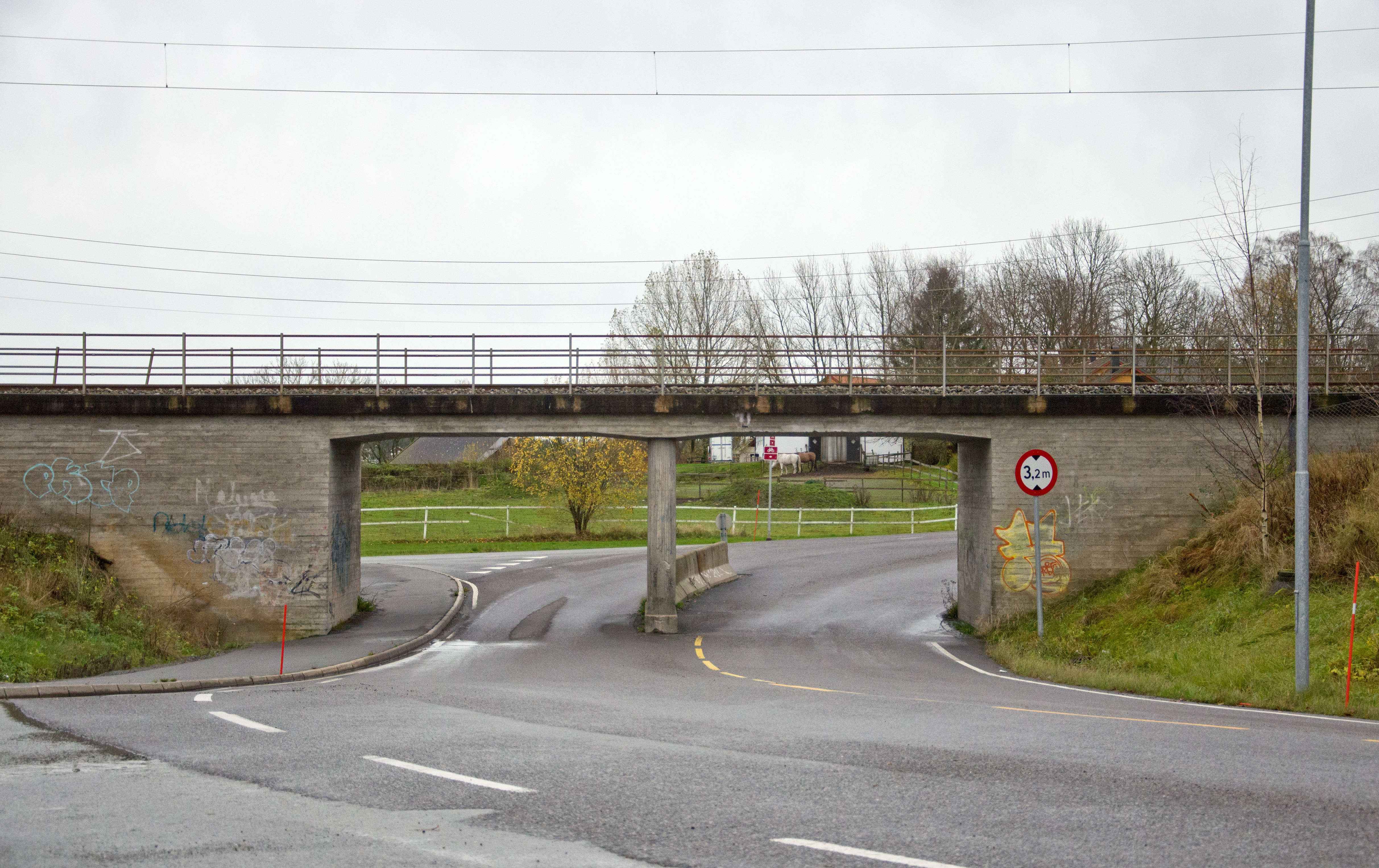 Vestfolds fylkesvei 270, kryss mellom Haslebakken, Vollane og Råstadveien i Sandefjord.